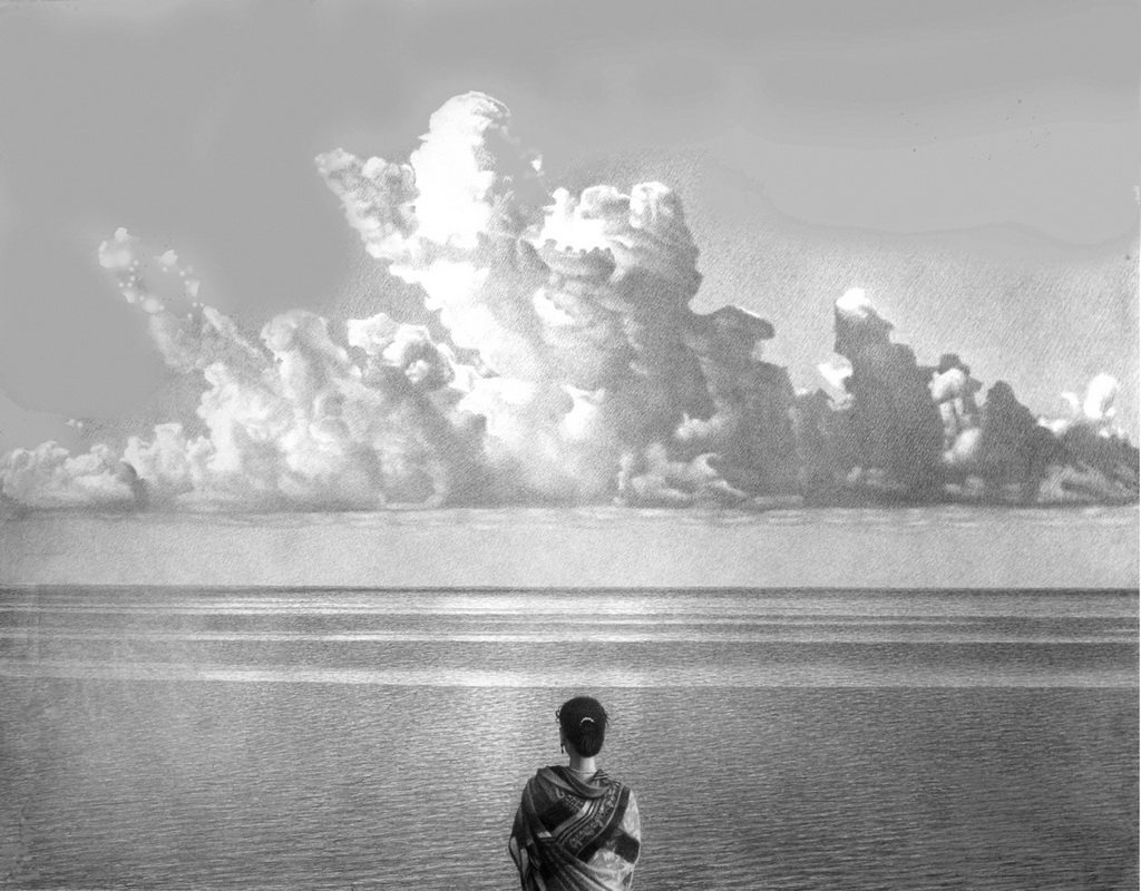 "Море Облако" Графика В.Каракашева